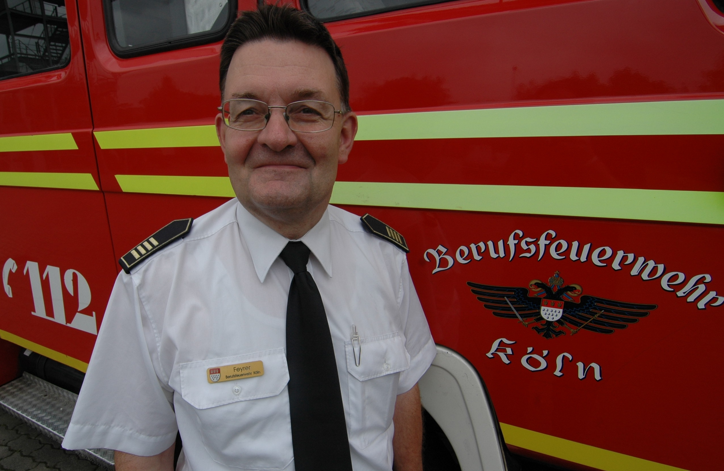 Johannes Feyrer, Leitender Branddirektor und Direktor der Berufsfeuerwehr Köln